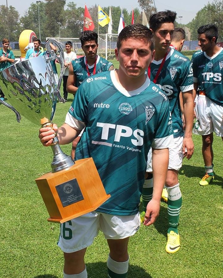 Fotografía del jugador de fútbol Jimmy Cisterna tomando el trofeo de la categoría sub 19 de Chile.